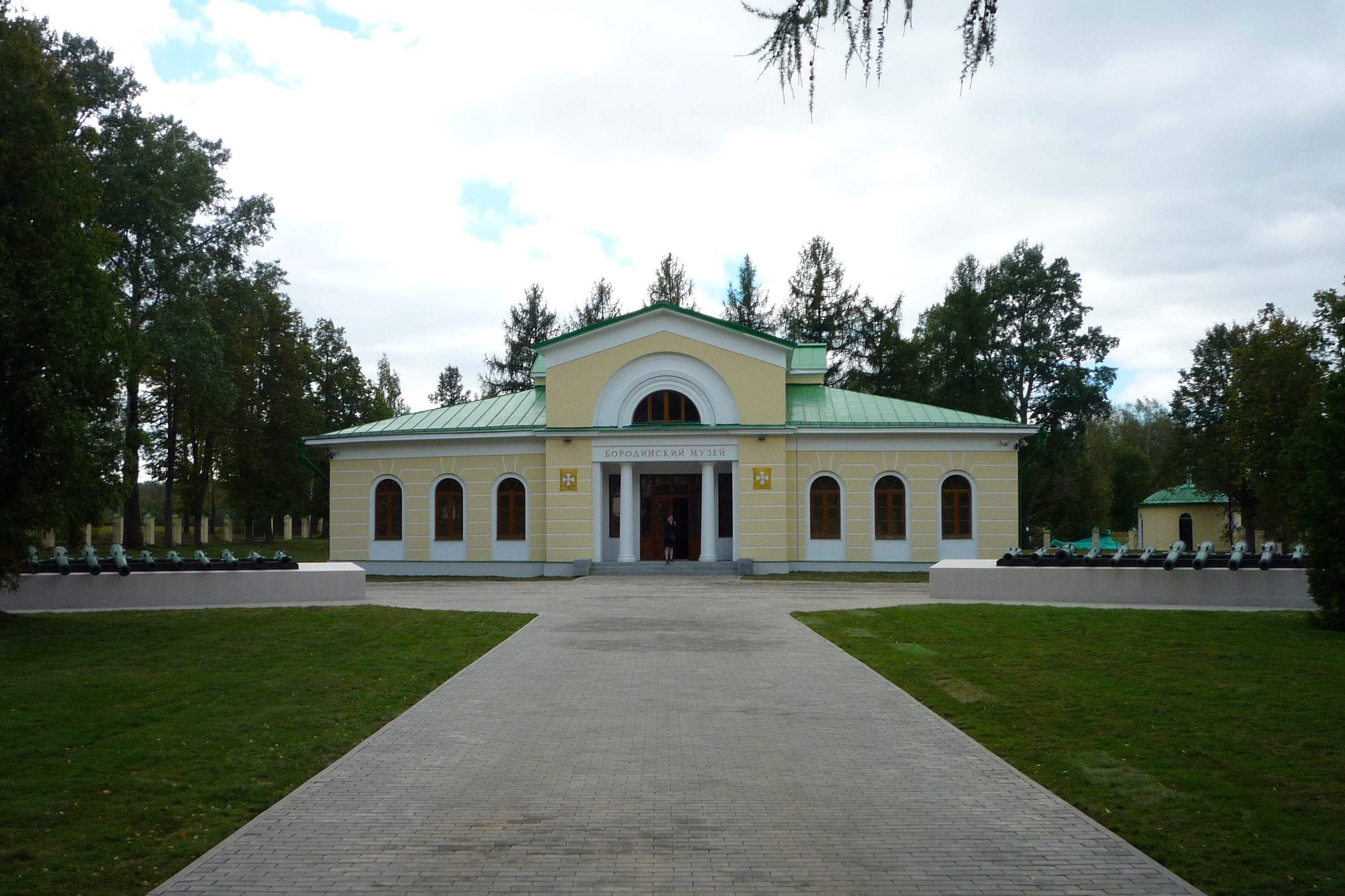 Бородинский музей: восточнее поселка, пос. Бородинского музея, Можайский район, Московская область